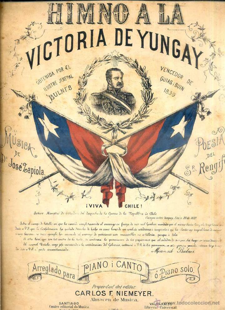 Portada partitura del Himno a Yungay. Zapiola/Rengifo Música dd José Zapiola y Letra de Ramón Rengifo